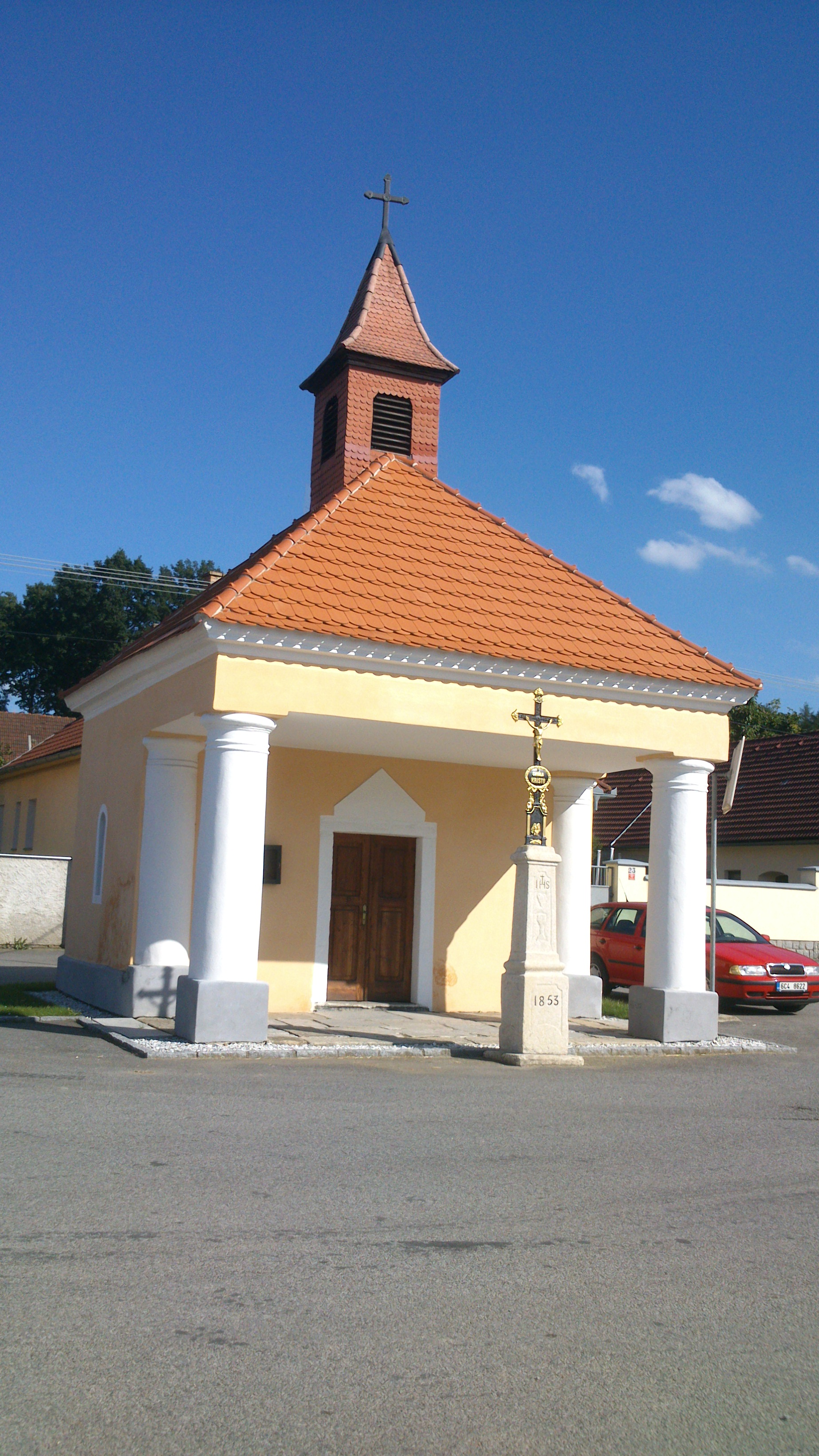 kaplička na návsi